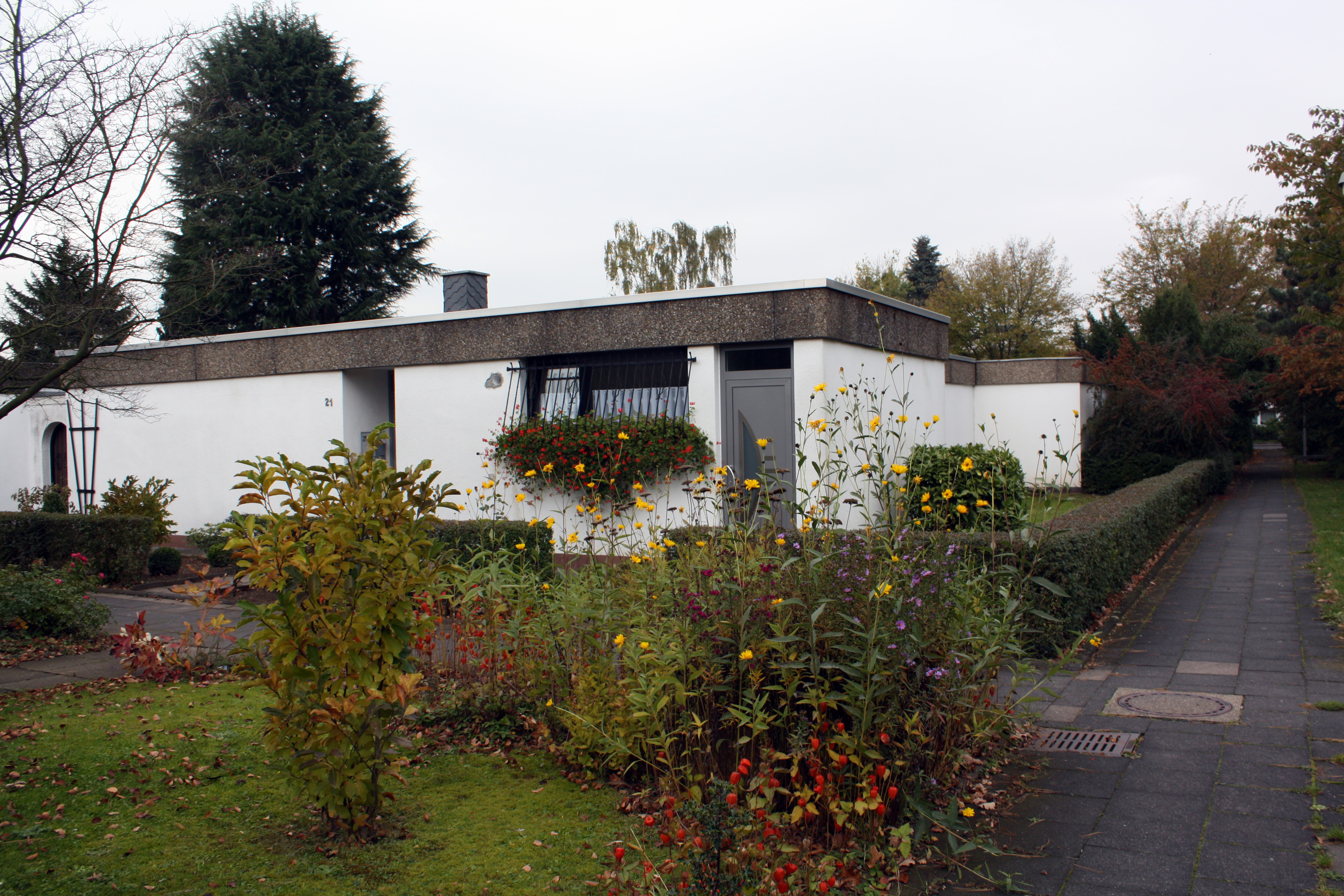 Köln-Neubrück